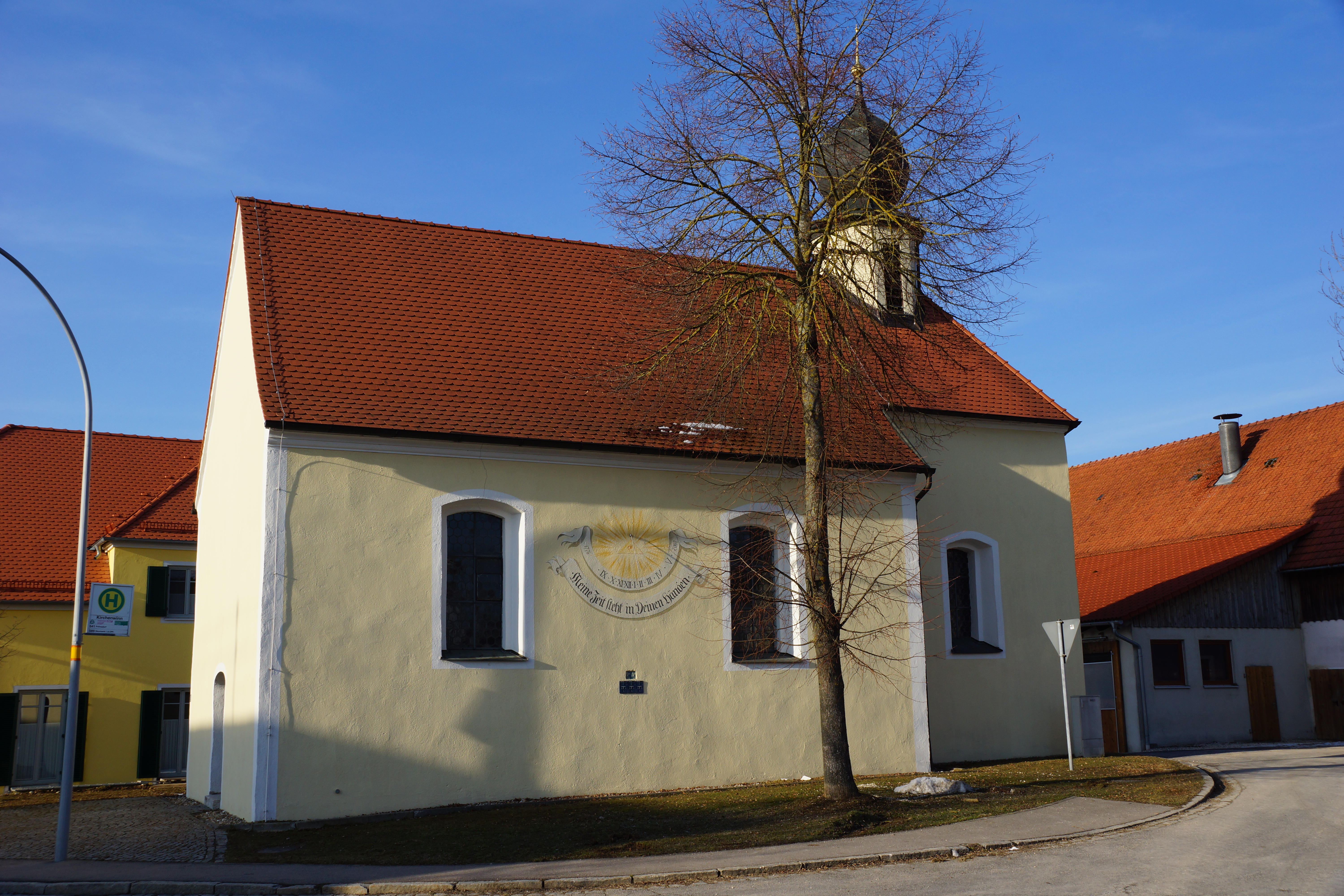 Die katholische Filialkirche St. Johannes in Kirchenwinn